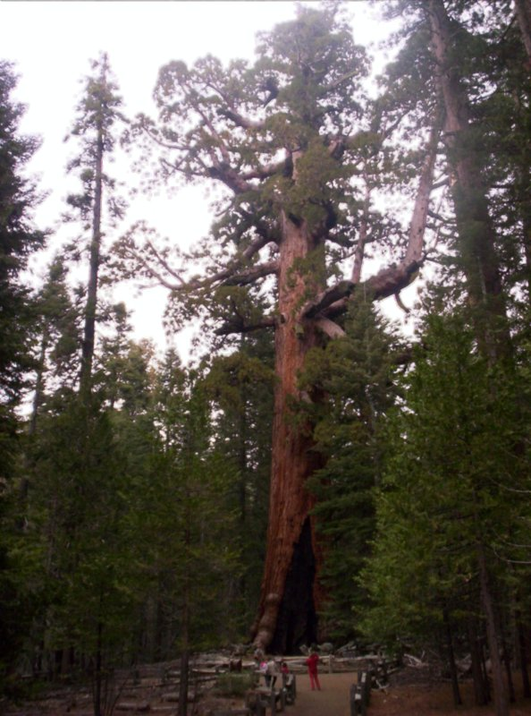 Sequoia Giant Grizzly (Yosemite)